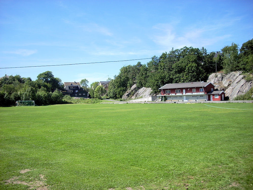 IL Sørfjell fotballbane på Eydehavn. Klubbus i senter.